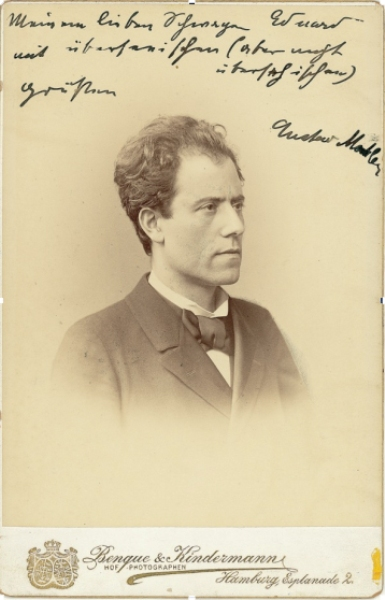 Портрет Густава Малера (Гамбург, 1896)